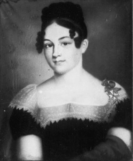 Prinzessin Ida von Waldeck und Pyrmont, spätere Fürstin von Schaumburg-Lippe (1796-1869)